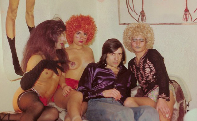 Pierrot en el rodaje de la película 'Miss Dracula'.